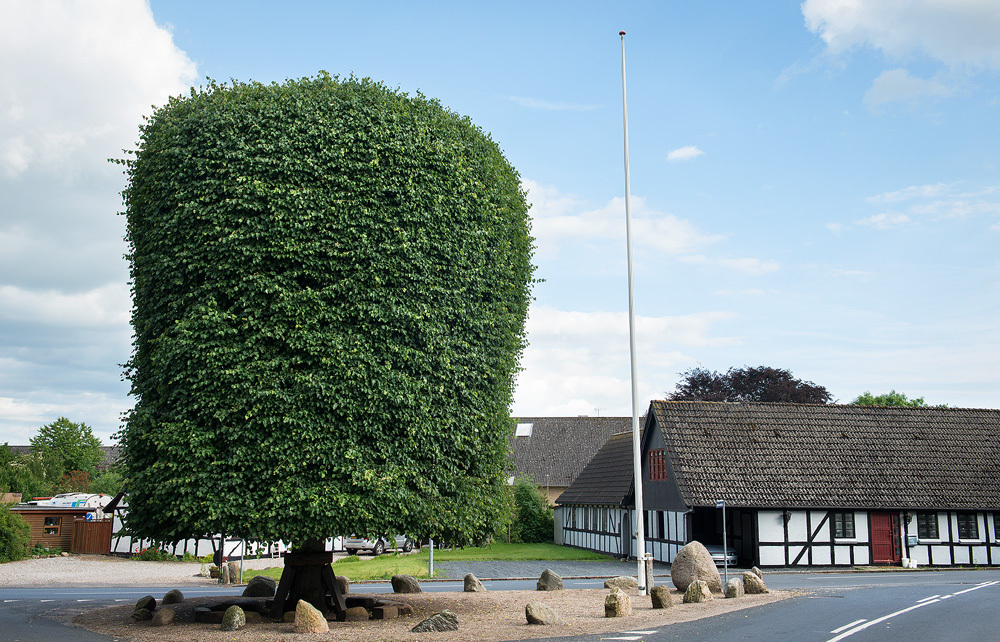 Davindelinden er et lindetræ, som er plantet i den fynske landsby, Davinde, da byjorden var udskiftet i 1816. Beboerne ønskede at fastholde skikken med et bystævne og opstillede flere sten rundt om det nyplantede træ. Træet bliver endnu i dag klippet af byens borgere på Sankthansaften den 23. juni for at bevare den valgte, kuplede form.